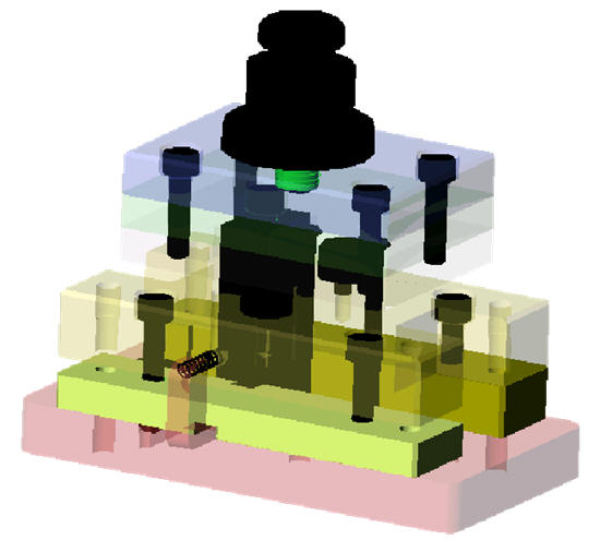 Zusammenbau Biegewerkzeug